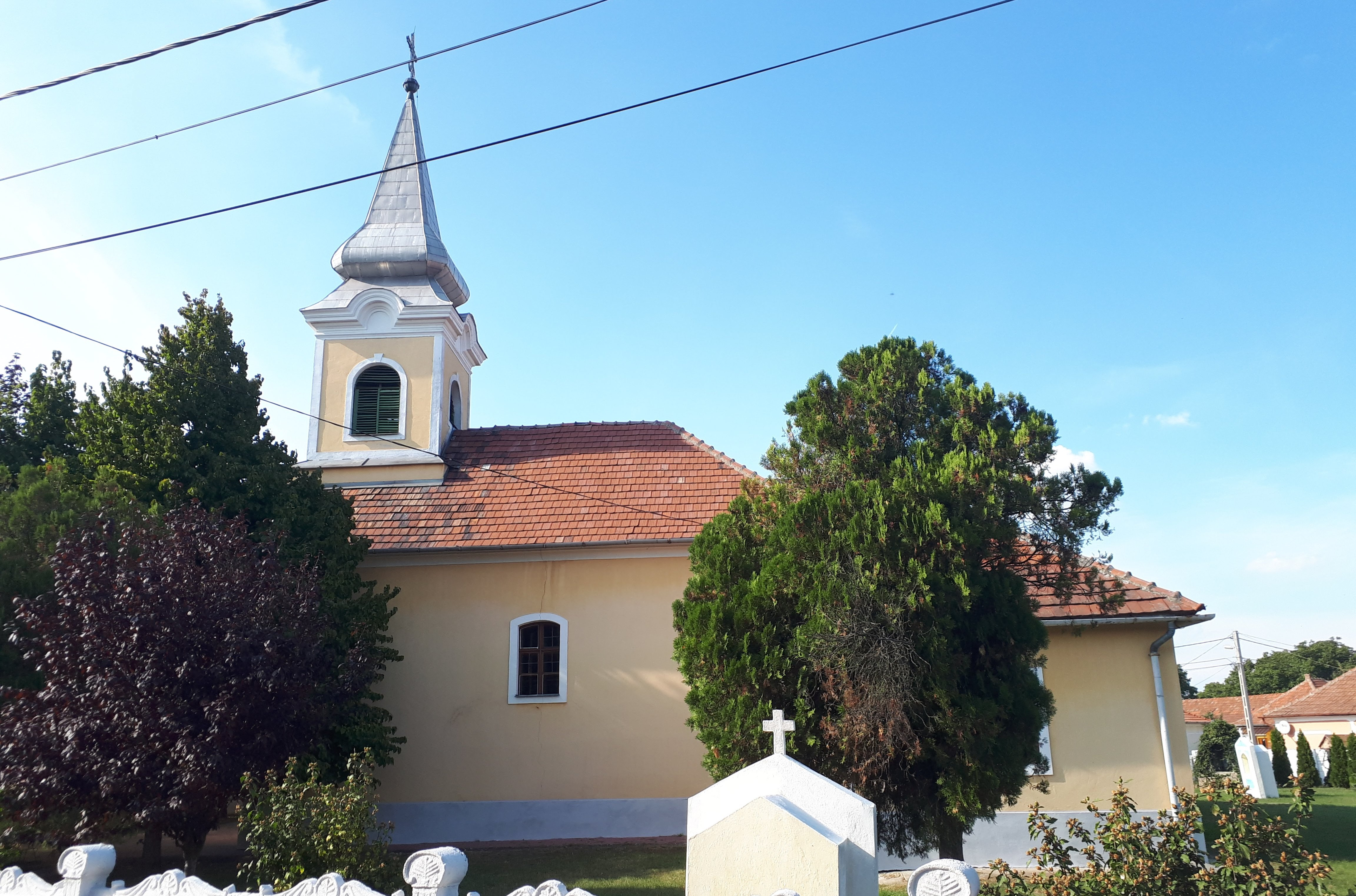 Köröm műemlék barokk római katolikus temploma, 1729-ben épült This is a photo of a monument in Hungary. Identifier: 2865